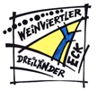 Logo der Kleinregion Weinviertler Dreiländereck